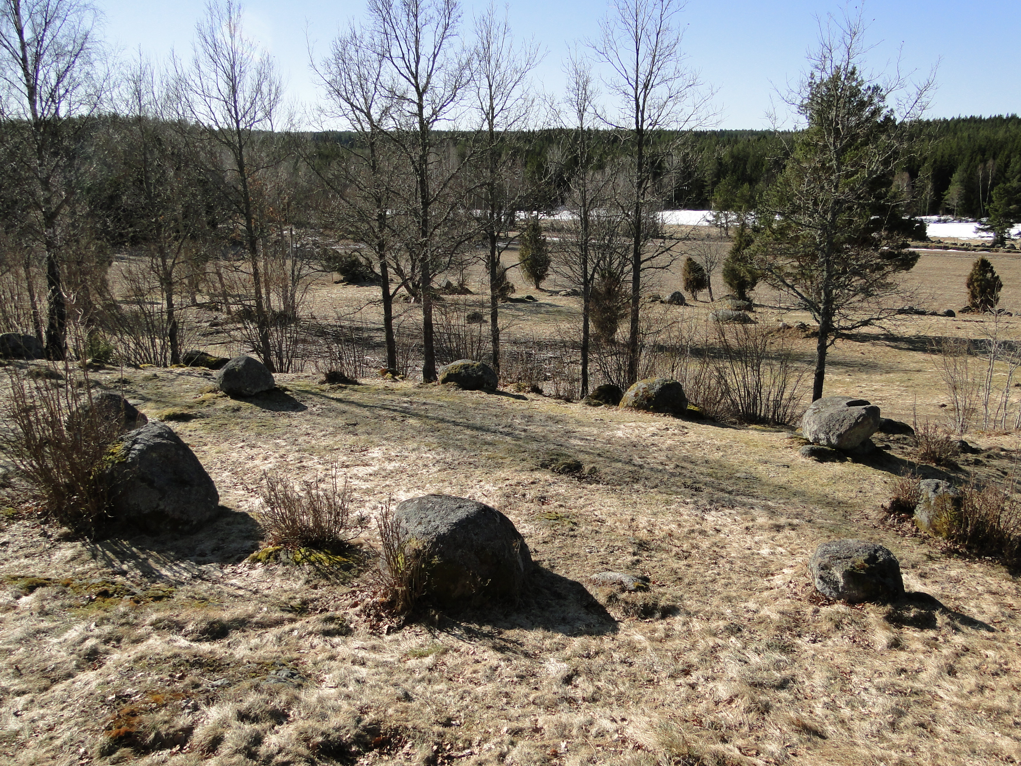 Domarring vid Qvigestad (Kvigestad) i Odensvi församling.